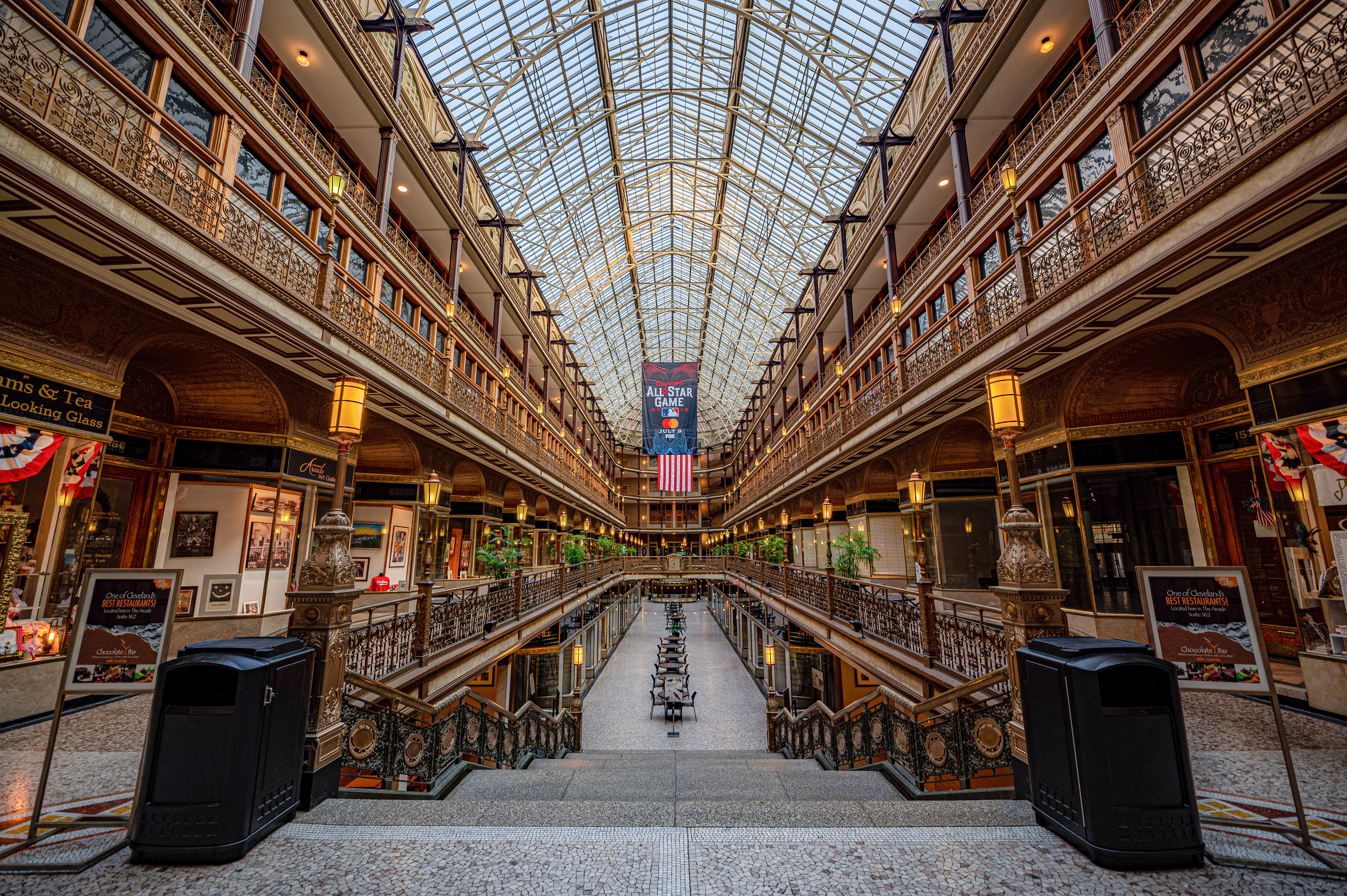 Arcade